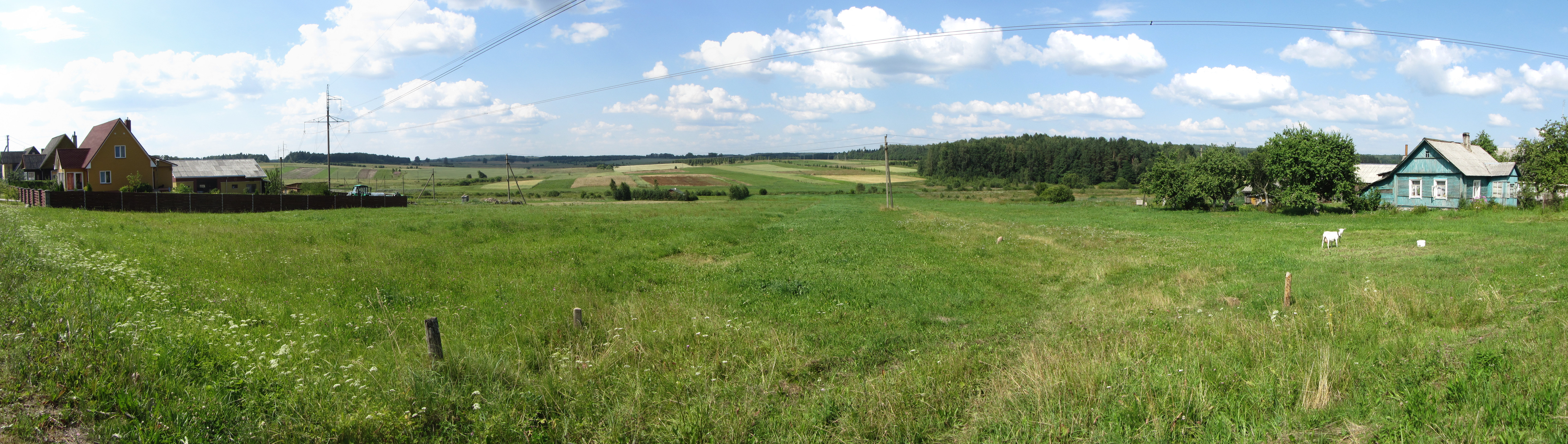 Rakonys, Lithuania